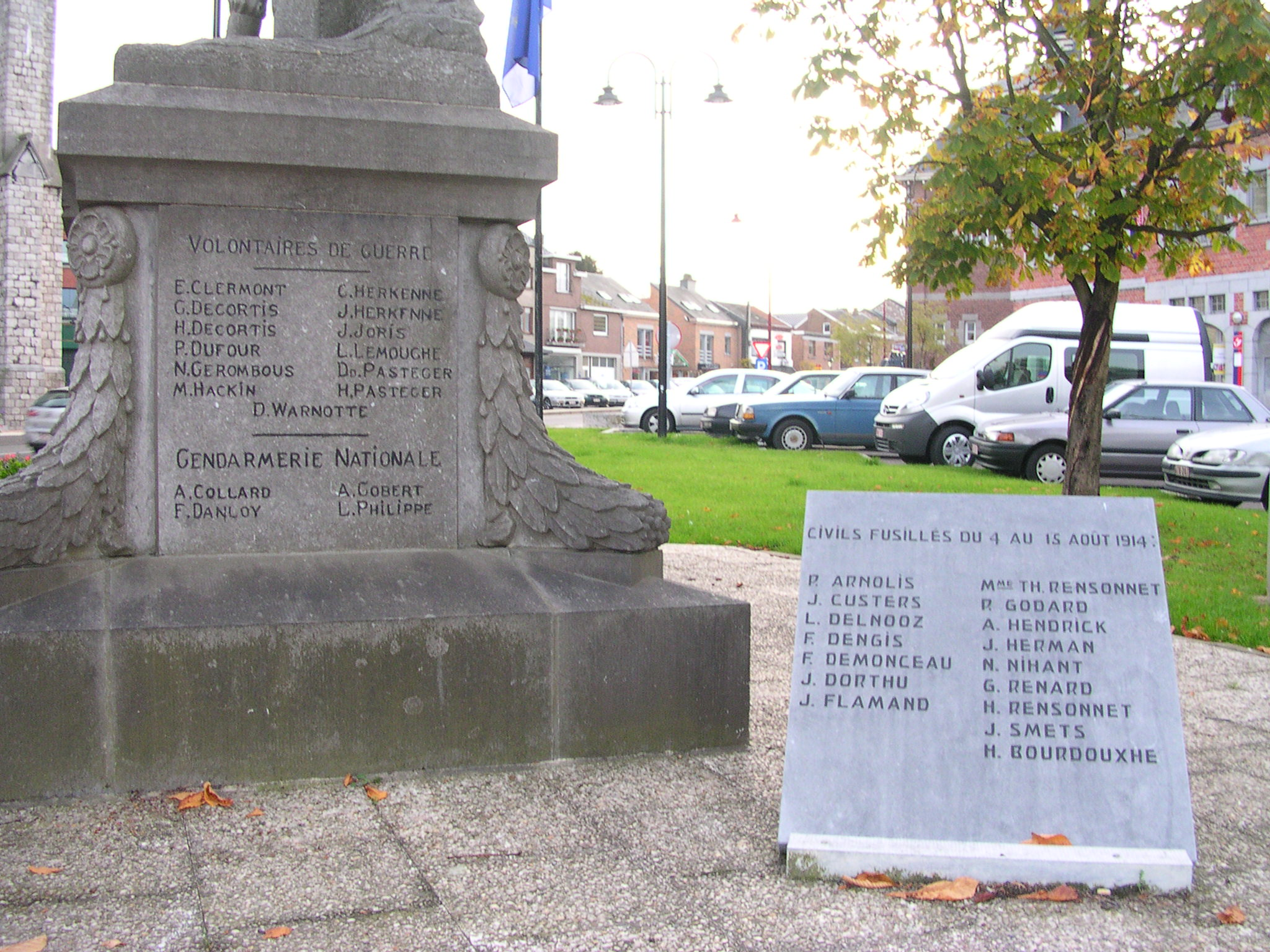 Denkmal für die Opfer des 1. Weltkriegs in Blegny bei Lüttich